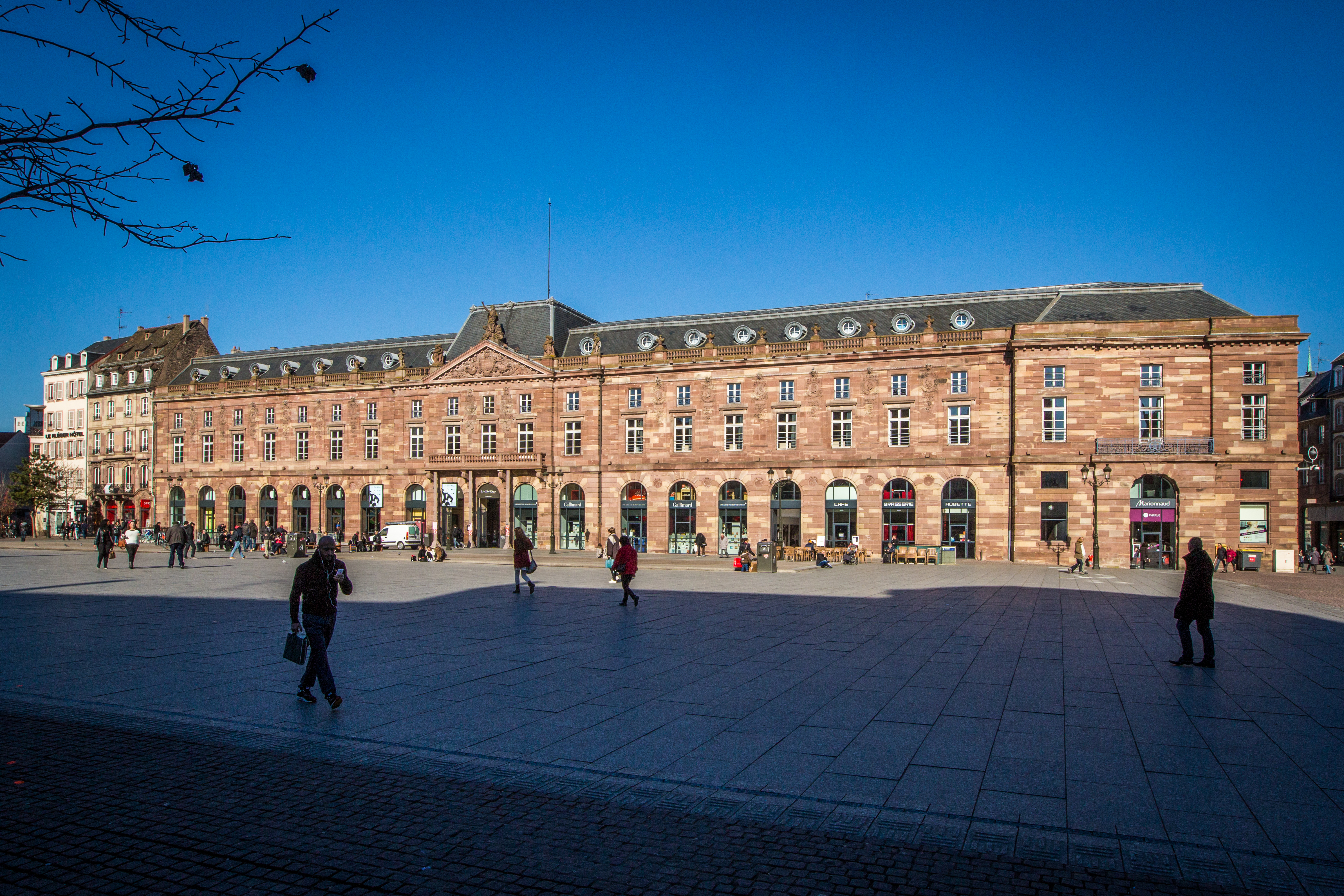 Le bâtiment de l'Aubette de Strasbourg est un long immeuble de facture classique, fermant la face nord de la place Kléber, la place centrale de Strasbourg. Ancien bâtiment militaire puis centre de loisirs, il fut construit de 1765 à 1778.